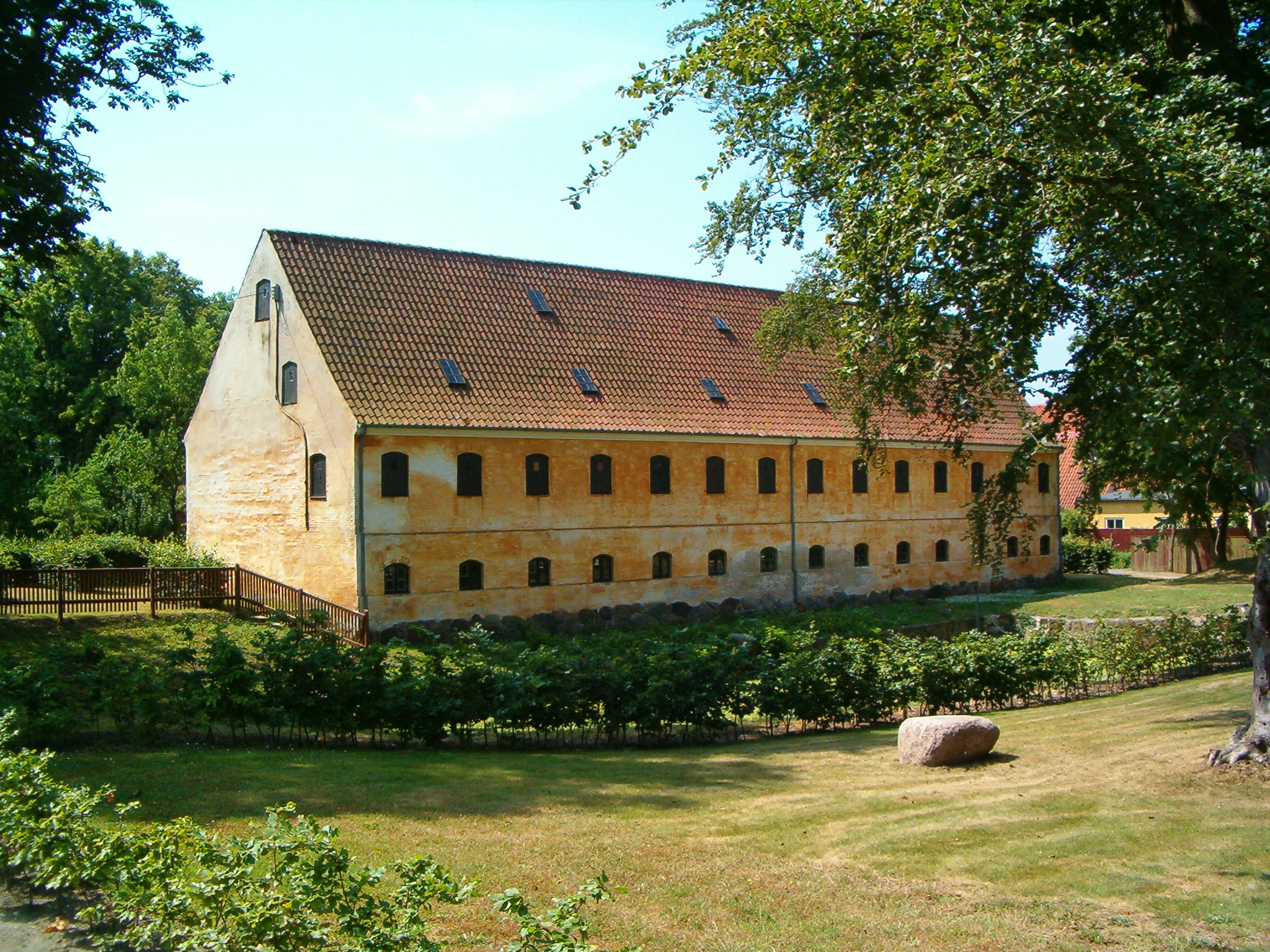 Gammelt pakhus - Old warehouse - Made by Erik Damskier Erik Damskier 22:22, 9 July 2006 (UTC)